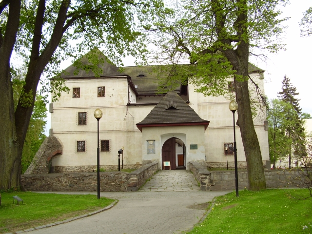 Vodní tvrz v Jeseníku. Autor: Lukáš Bocan